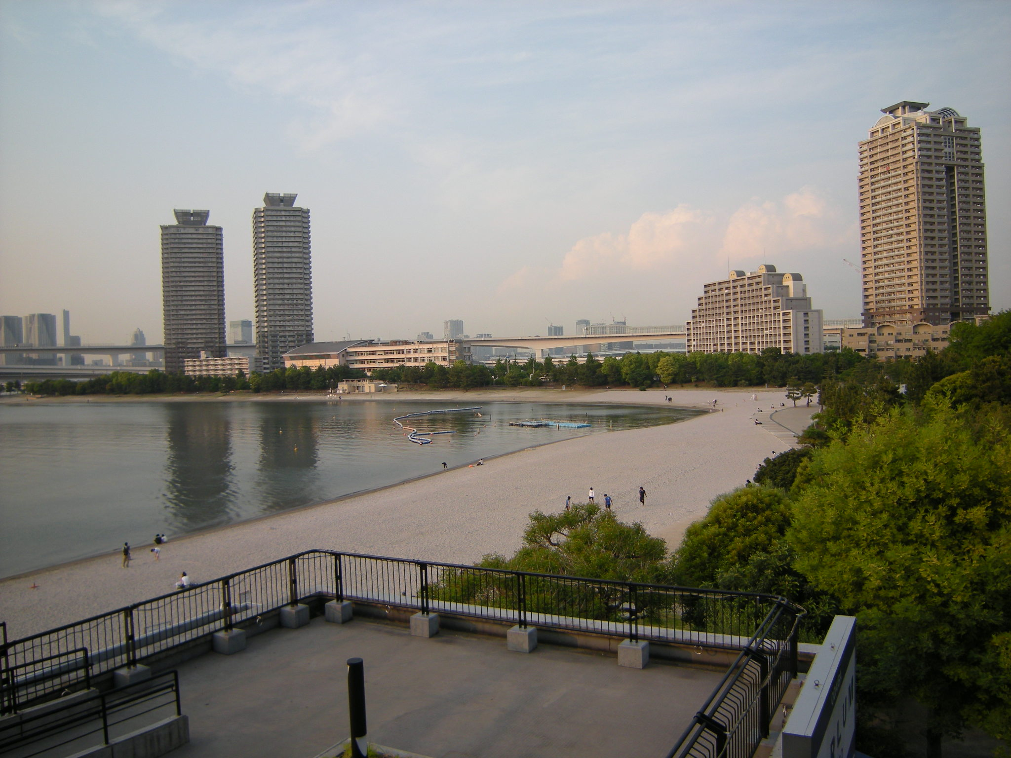 海浜公園